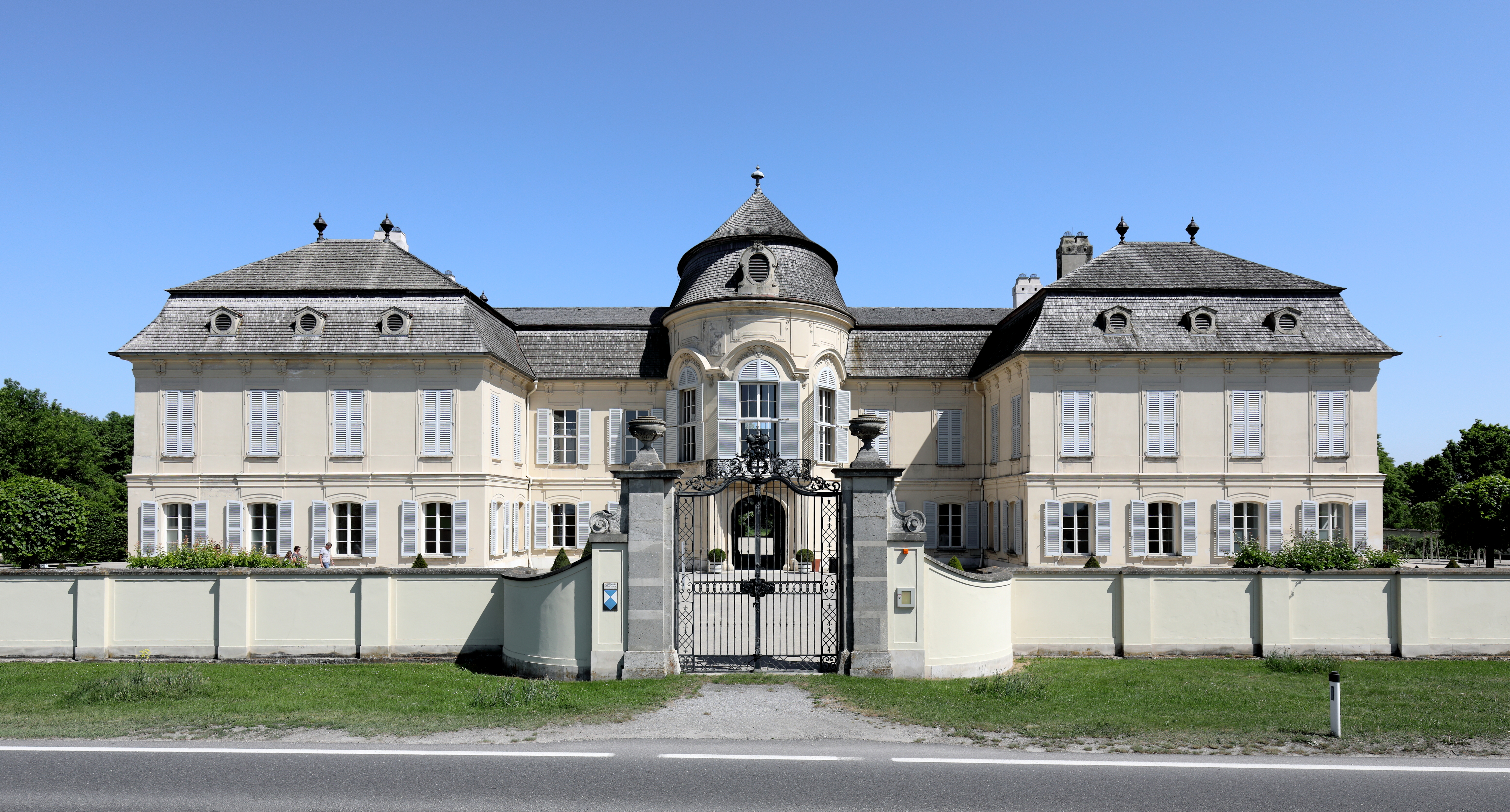 Westansicht bzw. straßenseitige Ansicht des Schlosses Niederweiden in der niederösterreichischen Marktgemeinde Engelhartstetten.Der Vorgängerbau wurde bei der 1. Türkenbelagerung zerstört. 1685 übernahm Ernst Rüdiger von Starhemberg die Herrschaft und ließ unmittelbar neben der öde Veste durch Johann Bernhard Fischer von Erlach ein Lustschloss errichten. 1725 wurde das Schloss von Prinz Eugen von Savoyen erworben und später dann von Maria Theresia. Diese ließ das Schloss um 1765 durch den Hofarchitekten Nikolaus Pacassi umbauen. Dabei erhielt das Schloss im Wesentlichen sein heutiges Erscheinungsbild. Nach schweren Kriegsschäden 1945 und einem Brand 1956 begann man mit der Restaurierung und Rekonstruktion, die 1986 abgeschlossen wurde.